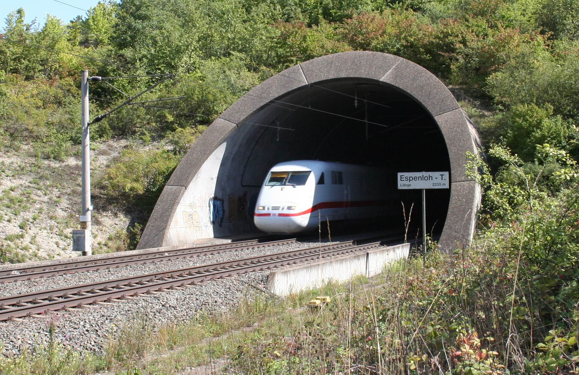 Espenloh-Tunnelnördliche Seite bei Leinach / Zellingen am Main